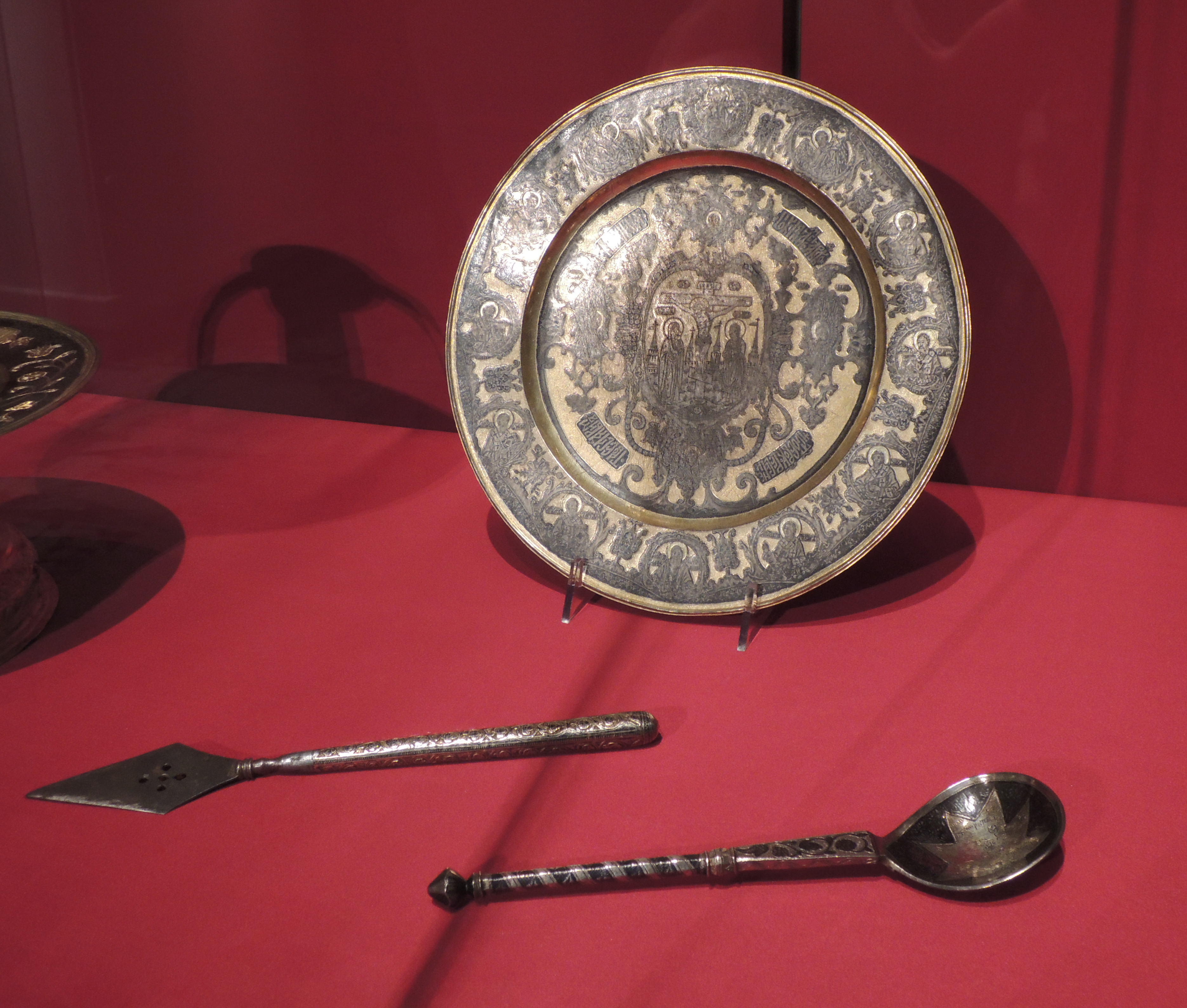 Литургические предметы. Москва, мастерские Кремля, 2-я половина 17 века. Серебро, чеканка, резьба, чернь, золочение. ММК. Потир, дискос, звездица, тарель, копие и лжица составляют группу богослужебных предметов, которые используются во время литургии.